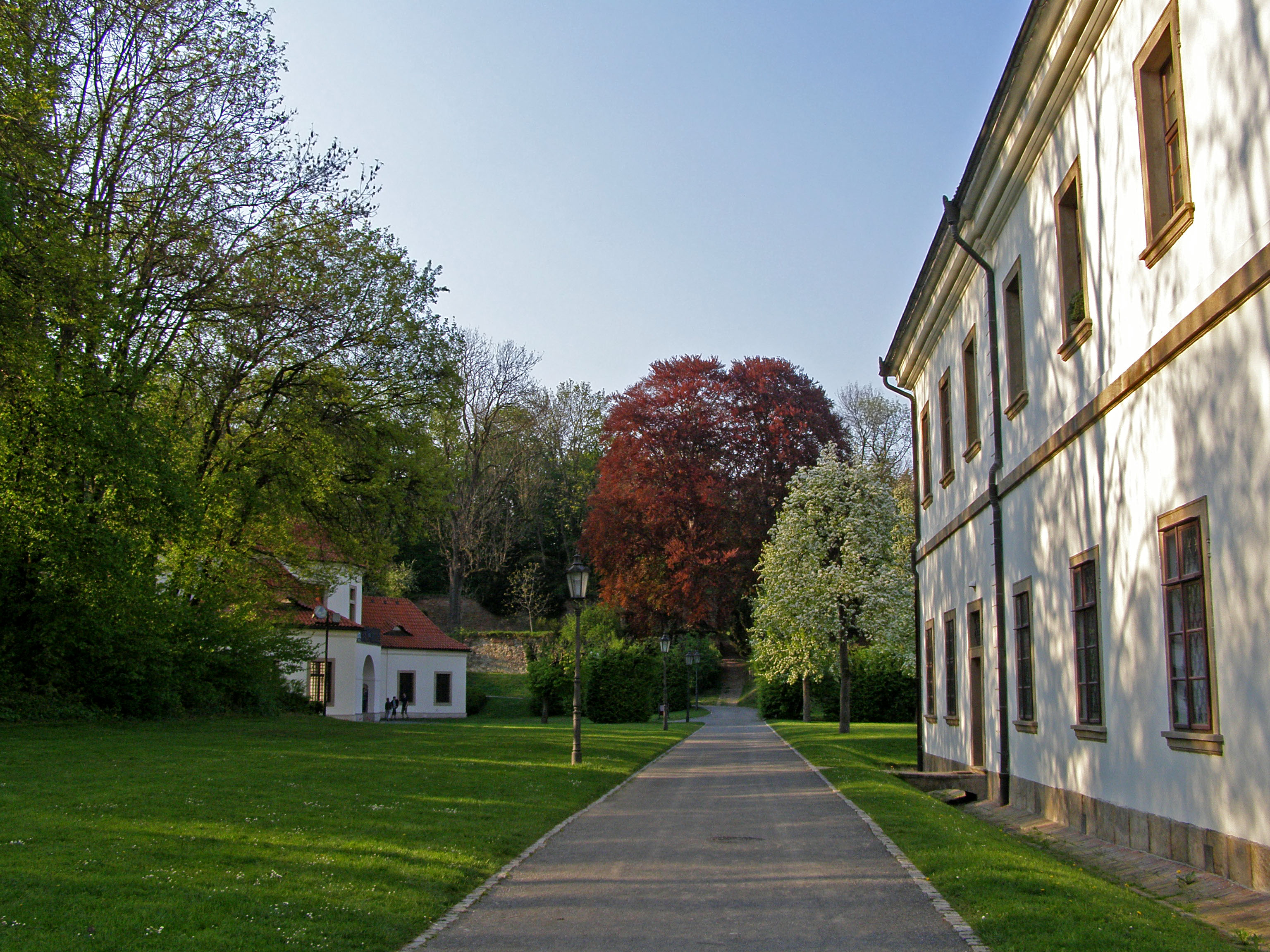 Praha, Břevnovský klášter, klášterní zahrada